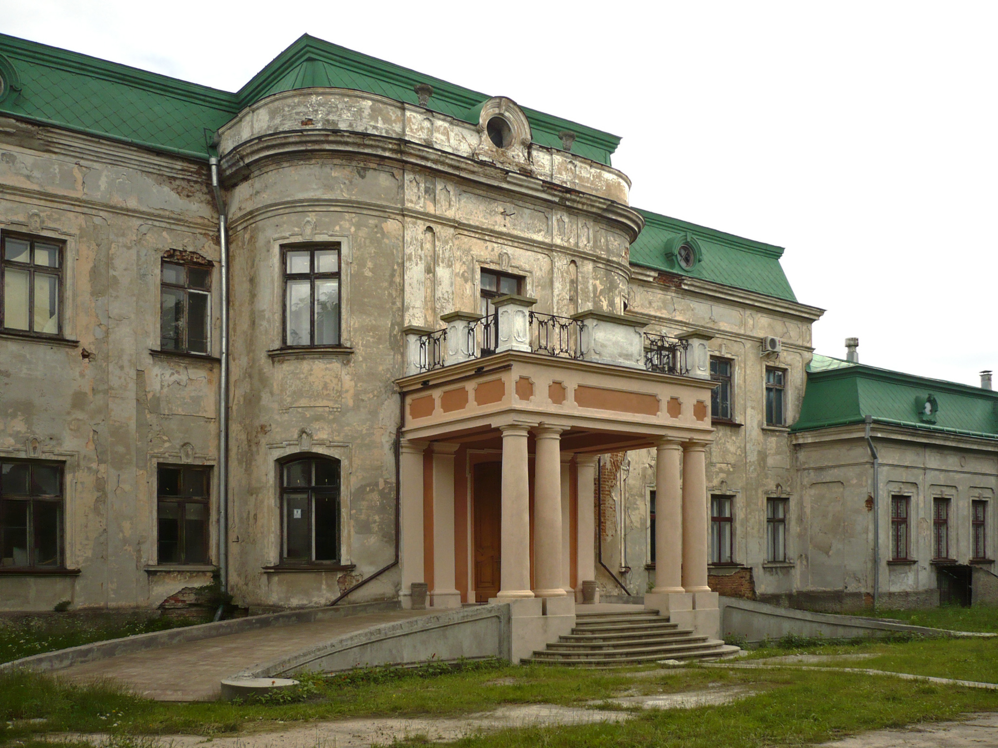 Pałac Potockich